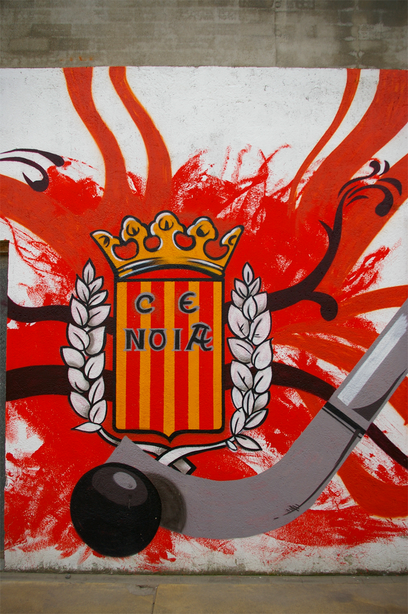 Mural a Sant Sadurní d'Anoia (Alt Penedès, Catalunya)